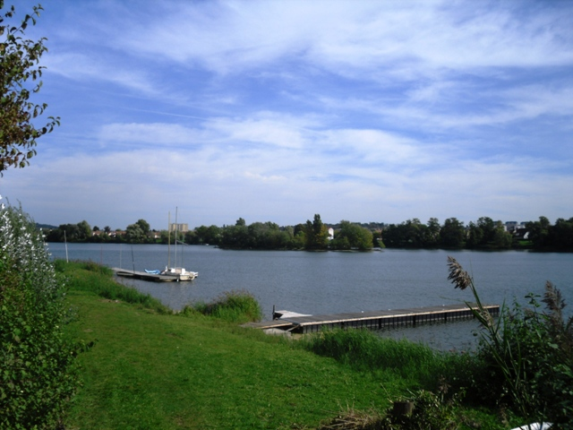 La fosse Montalbot à Vigneux-sur-Seine (91)